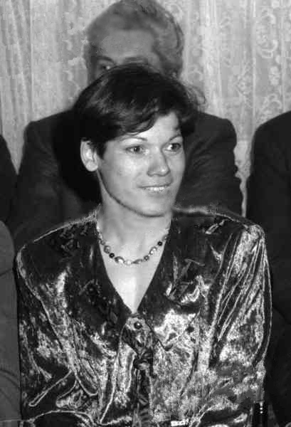 Liliana Năstase in Bucharest